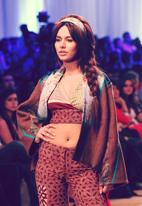 Ayyan - Fashion Week Pakistan 2012